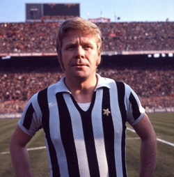 Helmut Haller 1971. Da der Fotograf noch nicht 70 Jahre tot ist, darf das Bild in der deutschsprachigen Wikipedia NICHT verwendet werden! (siehe unten)